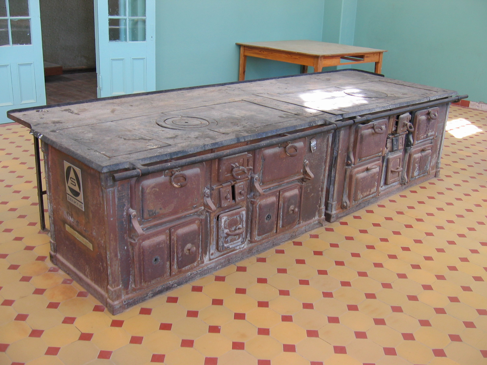 Küche im Ballsaalgebäude, Kolmannskuppe, Namibia